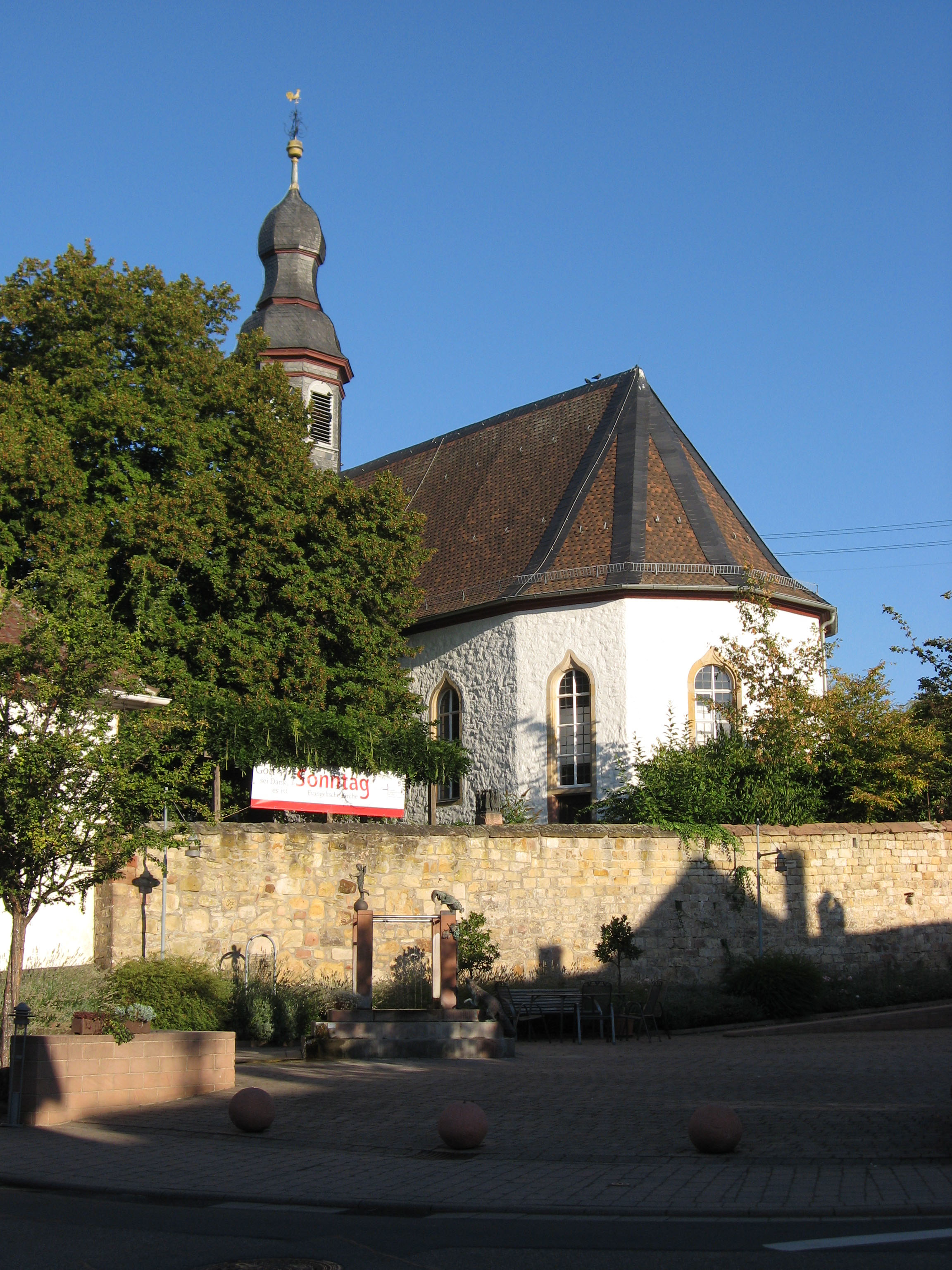 Protestantische Pfarrkirche in Böchingen; im Vordergrund der Dorfplatz